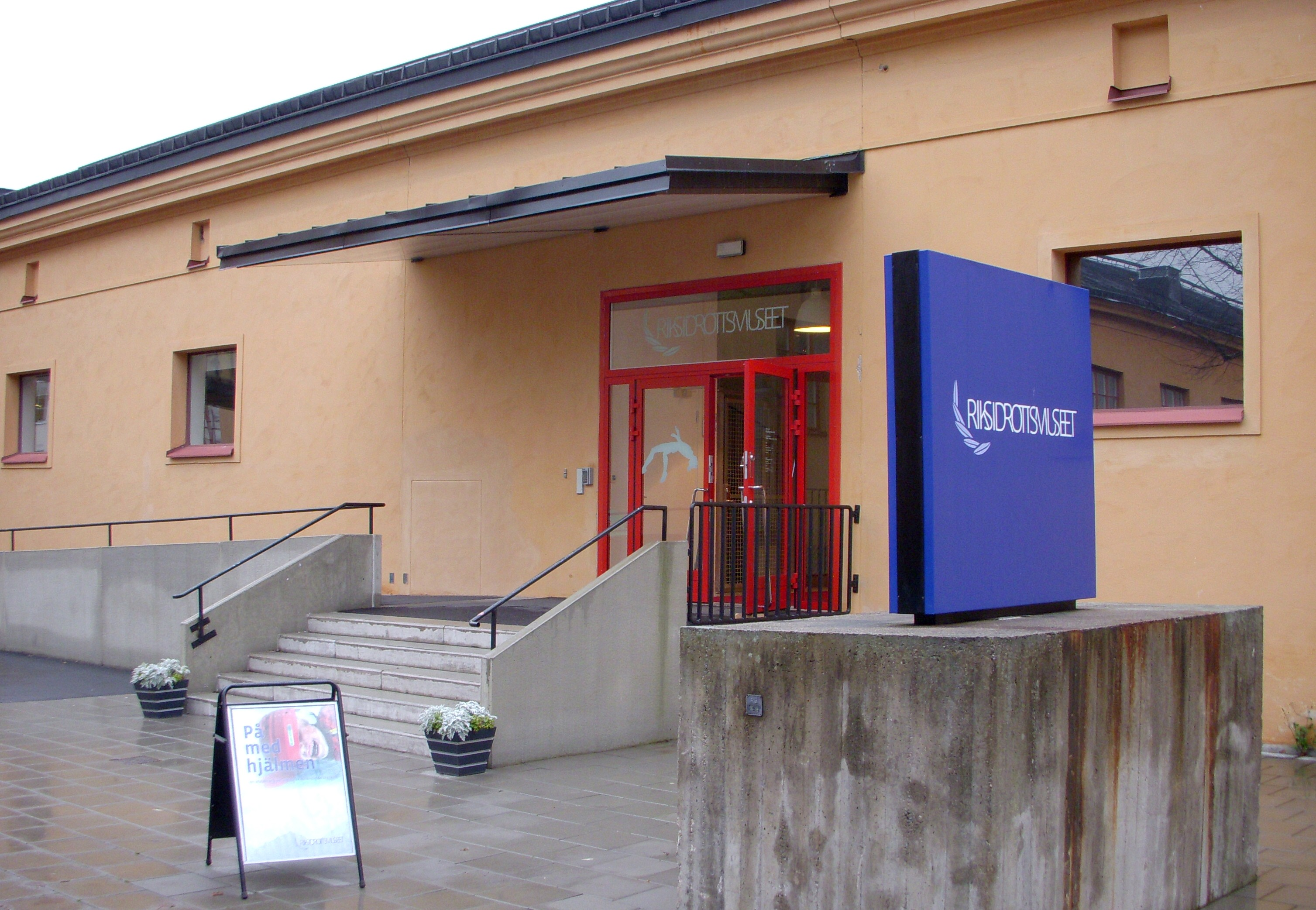 Riksidrottsmuseet på Gärdet i Stockholm, entrén